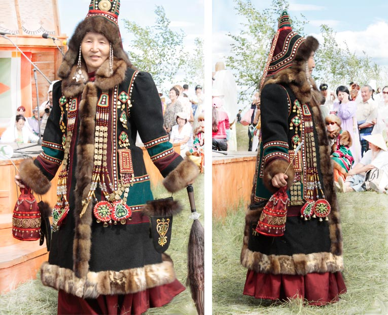 Традиционная якутская женская одежда (бууктаах сон). Снято во время праздника Ысыах в 2010г.